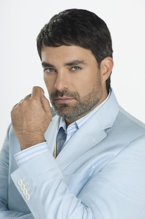 Última novela de Mauricio Islas